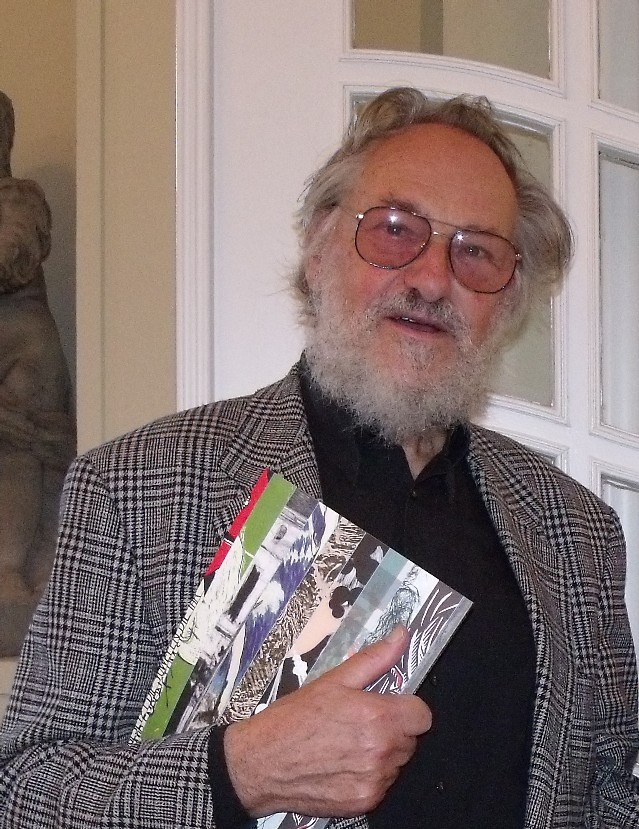 Der Karikaturist Harald Kretzschmar während einer Finissage im Berliner Ephraim-Palais.